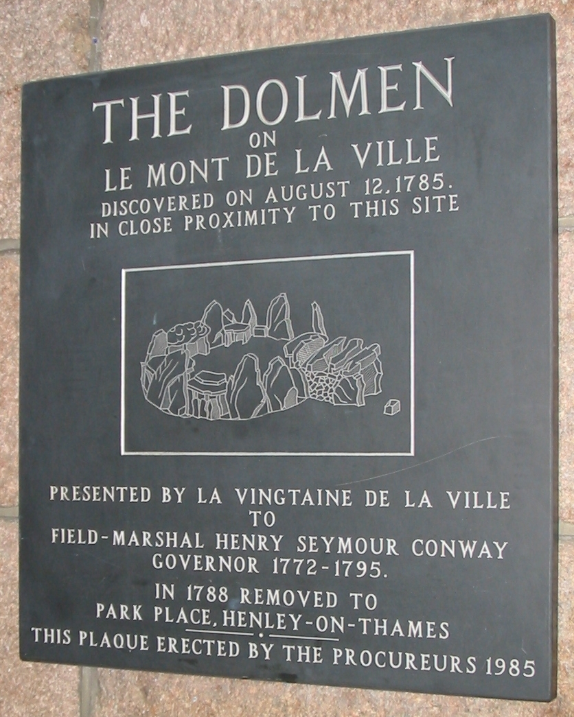 Nrf: Fort Régent, Saint Hélyi, Jèrri